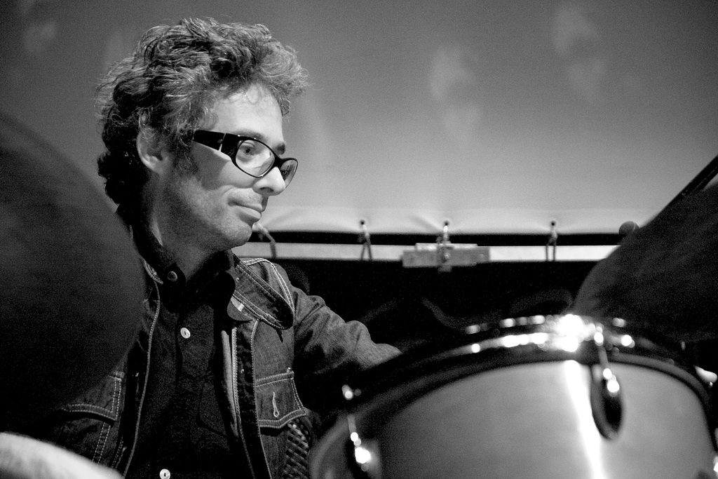 Steve Arguelles lors d'un concert d'Ambitronix à Paris en 2007